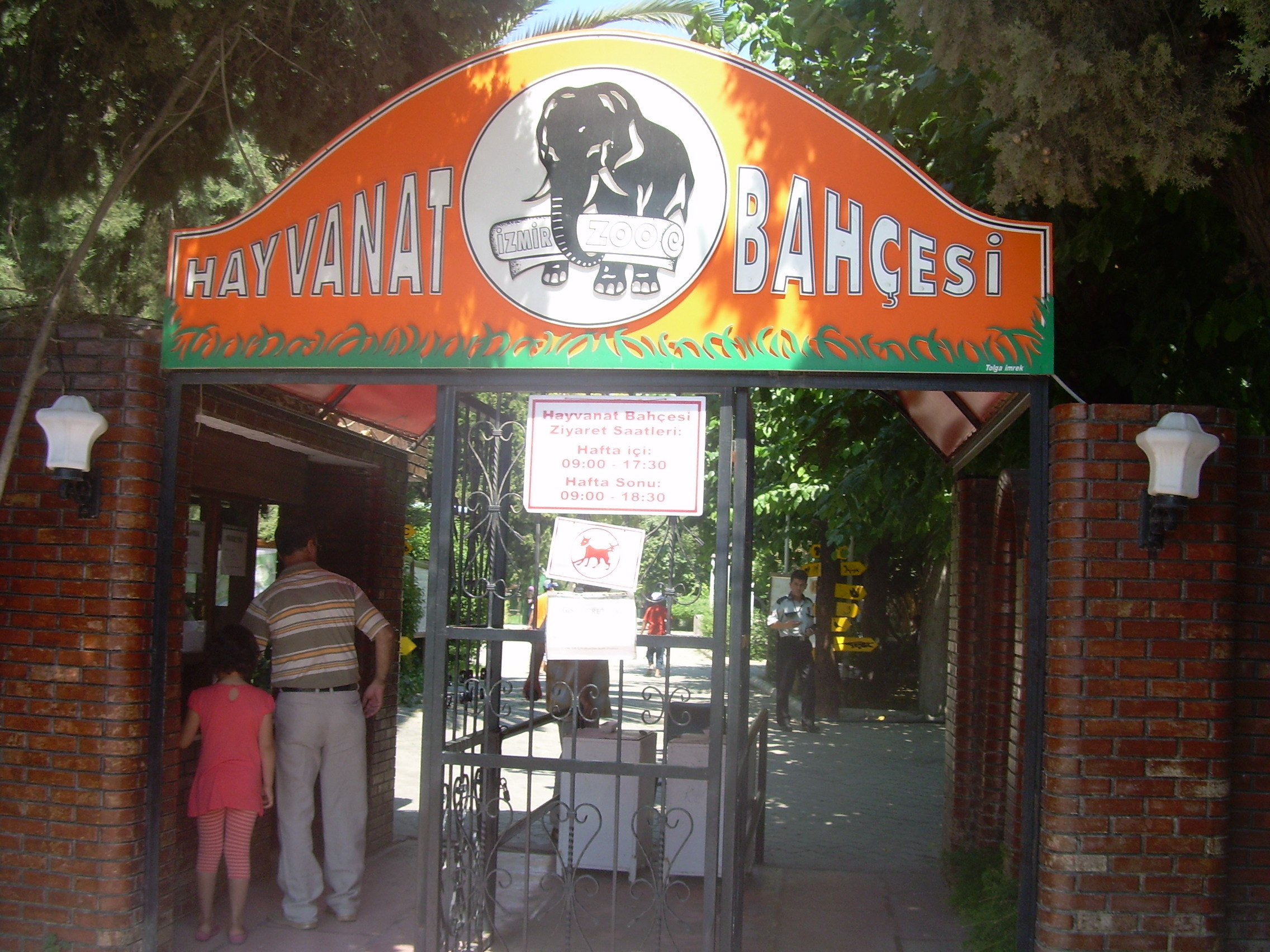 İzmir Kültürpark Hayvanat Bahçesi girişi